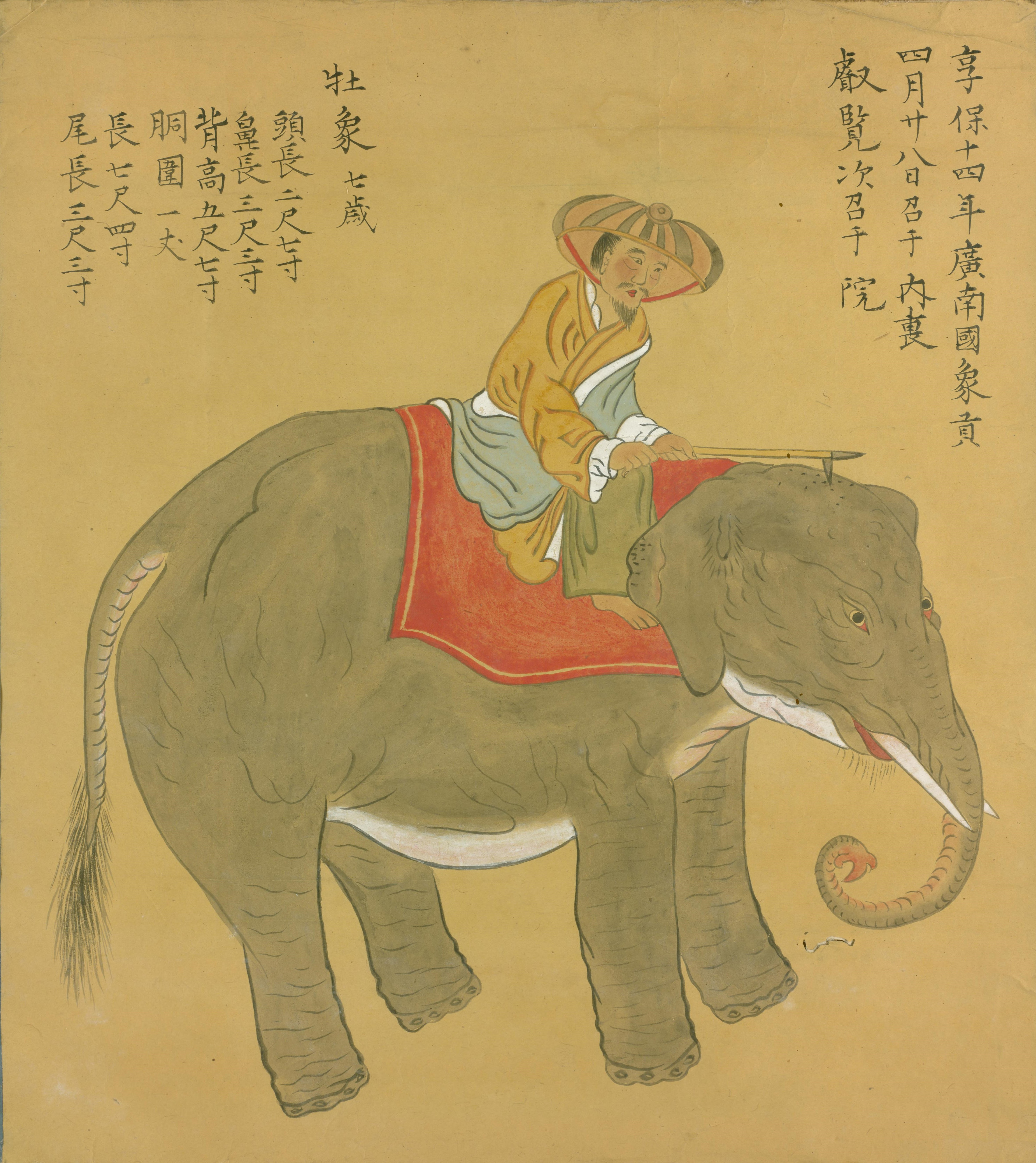 烏丸家所蔵『象之図』写本。1728年にベトナムから長崎に送られた牡象が、1729年に京都へ到着した際の様子を描いたもの。